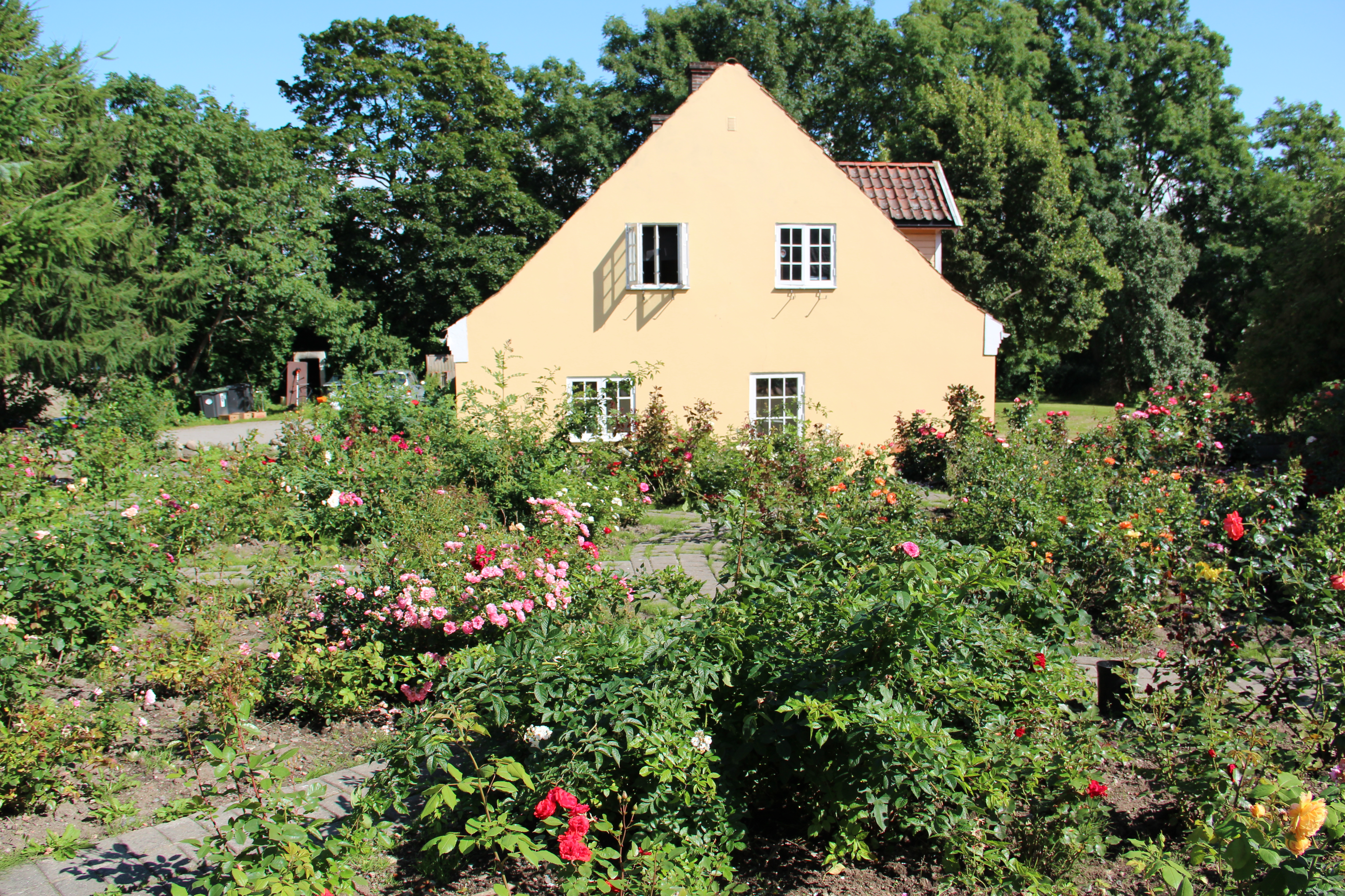 Rosehagen